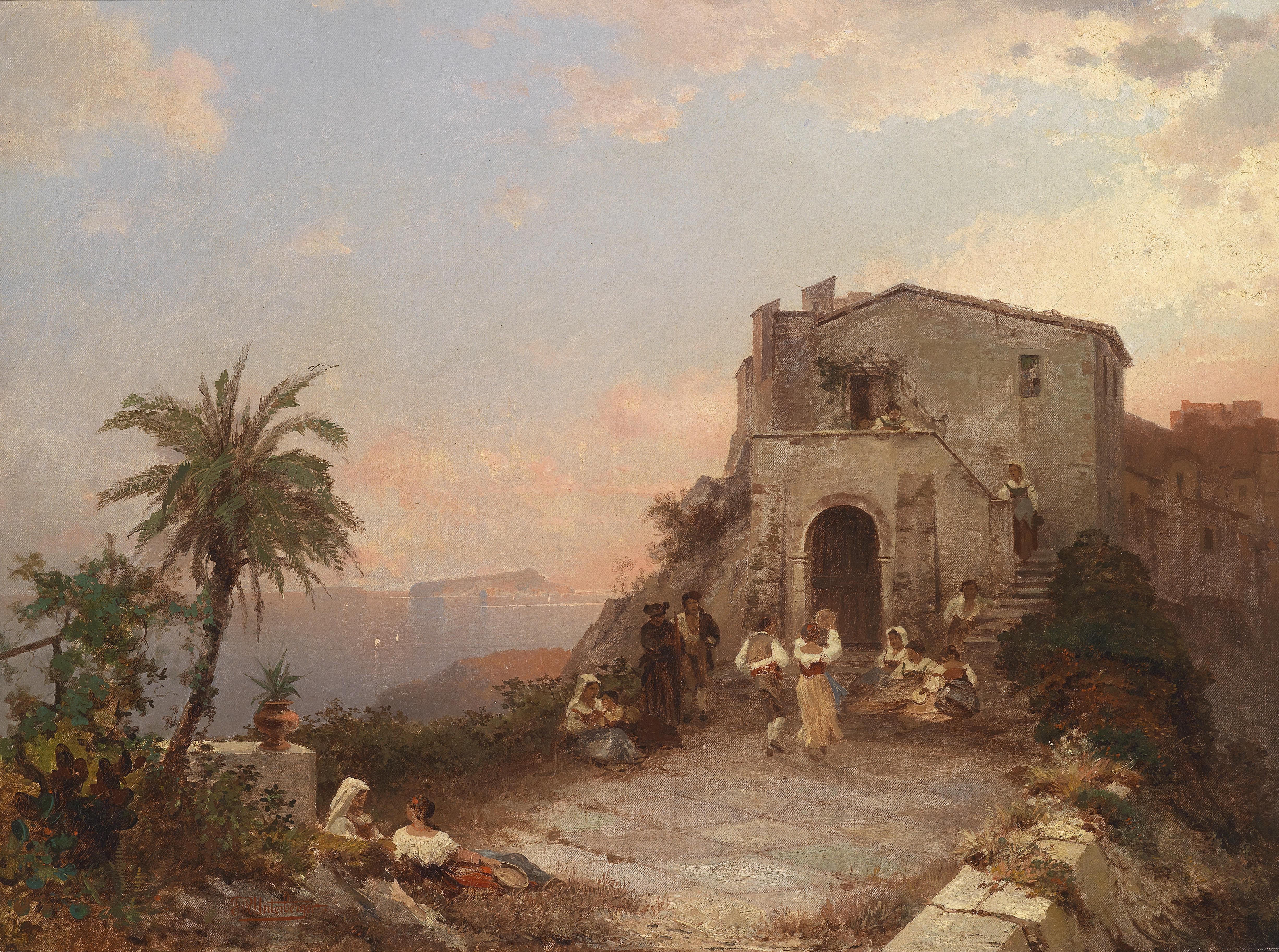 Sommerfest in Italientitle QS:P1476,de:"Sommerfest in Italien" label QS:Lde,"Sommerfest in Italien"